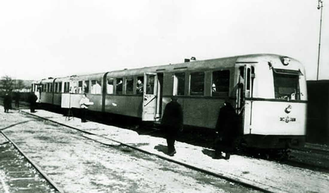 Schmalspurtriebzüge JDŽ-Reihe 801 in Lajkovac